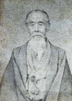 国立歴史民俗博物館所蔵鶴田清次関係資料123 （和服・髯姿鶴田清次キャビネサイズ写真）